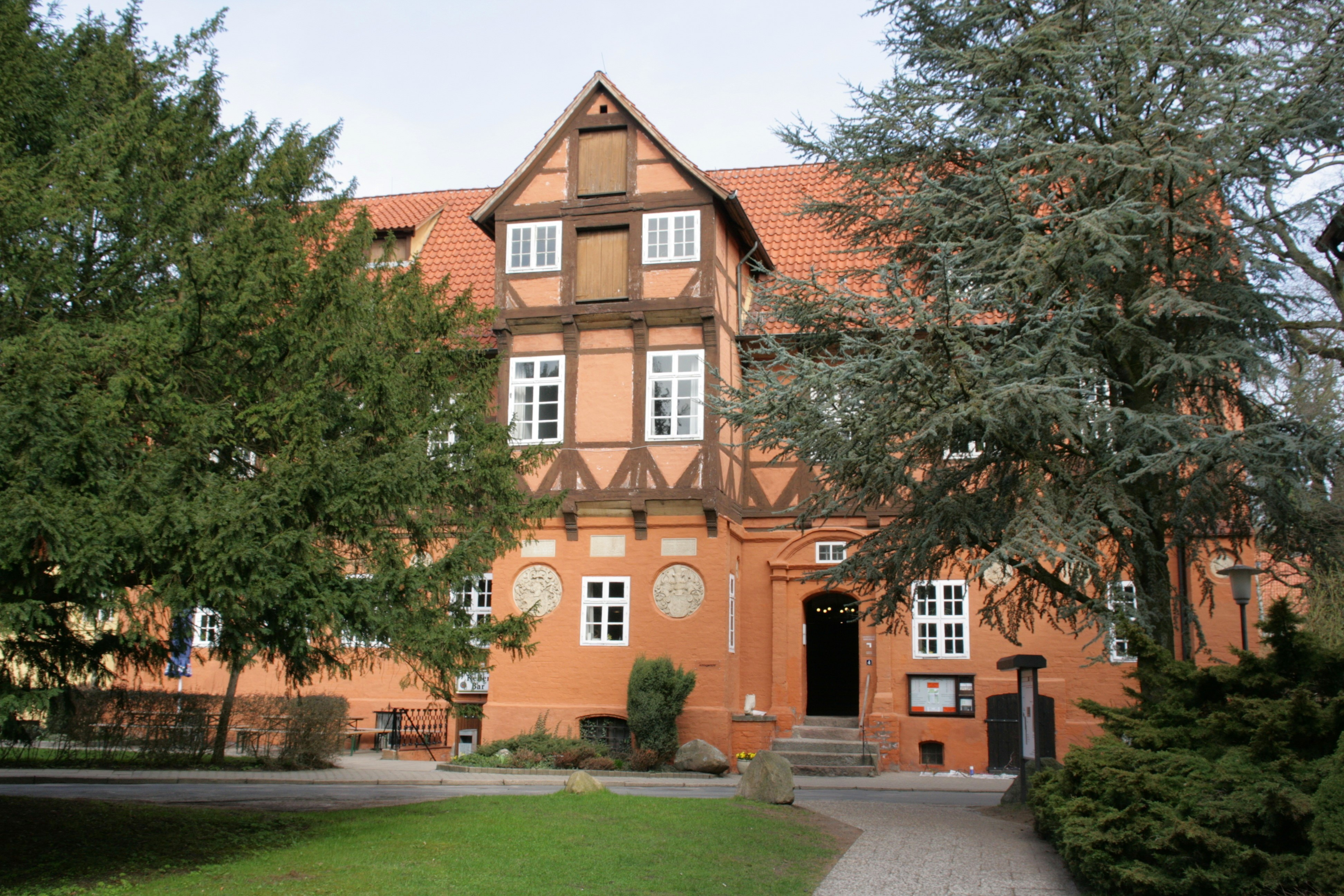 Altes Amtsgericht, jetzt Teil des Gustav Stresemann Instituts, Klosterweg 4 in Medingen, Bad Bevensen